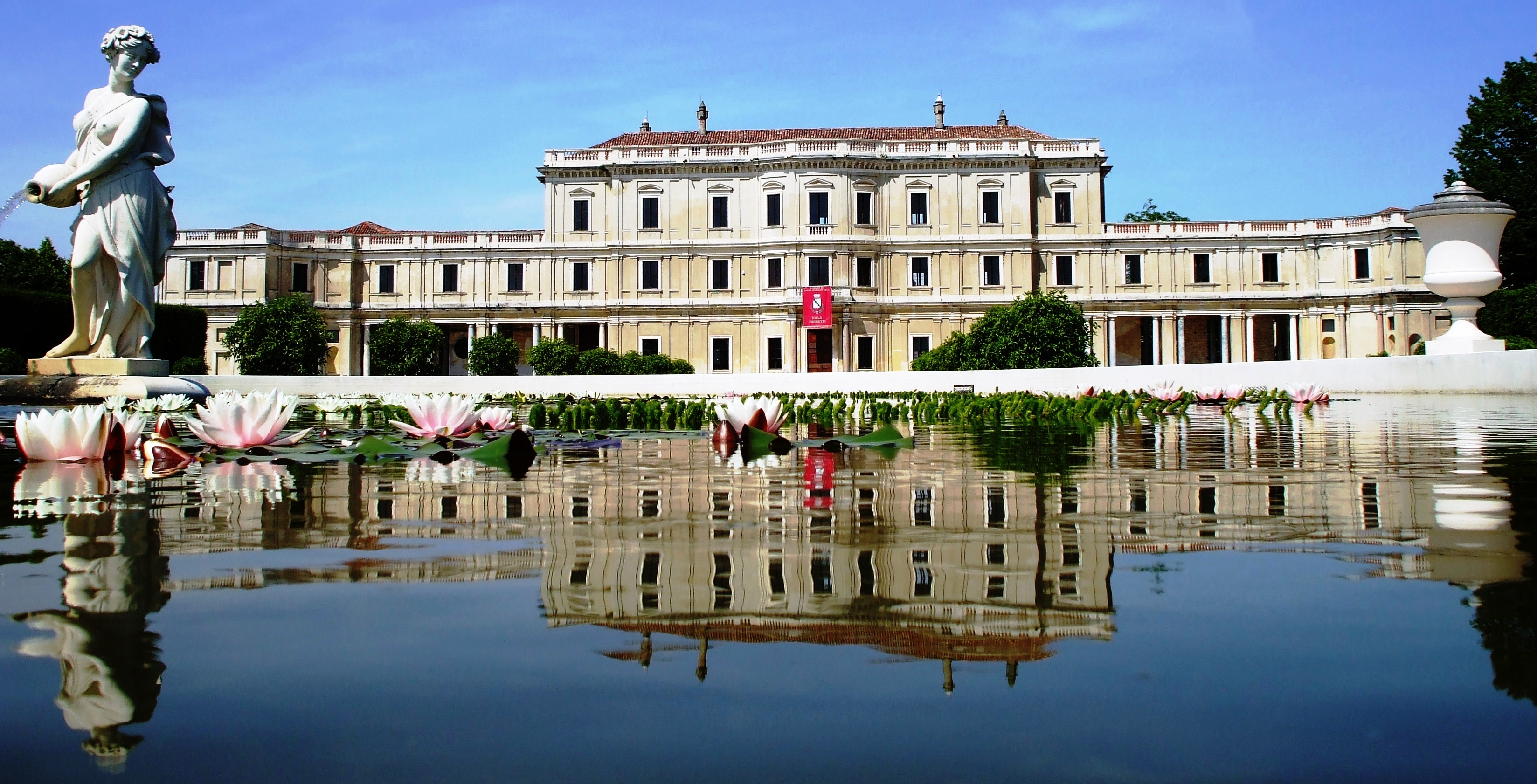 facciata Villa Farsetti